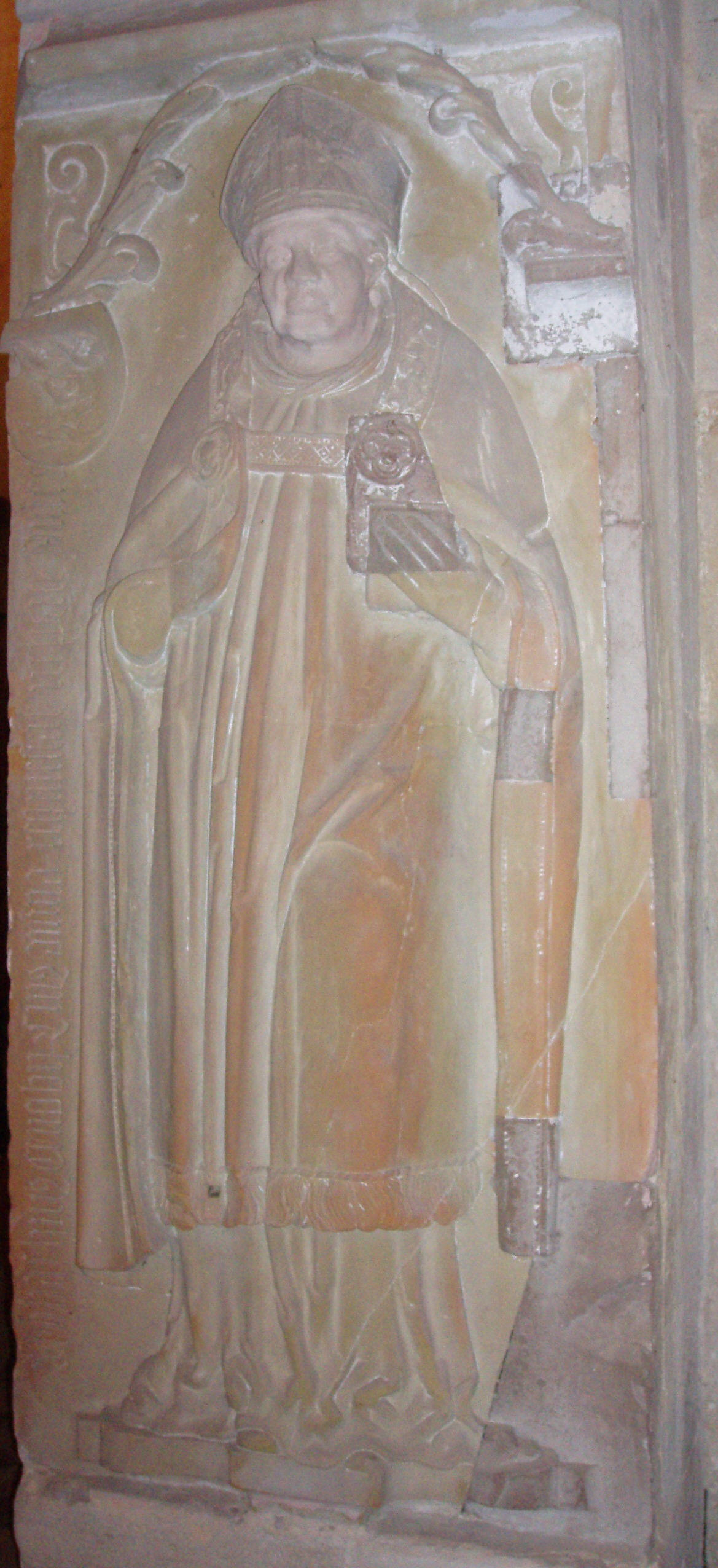 Kloster Lorch, Kirche